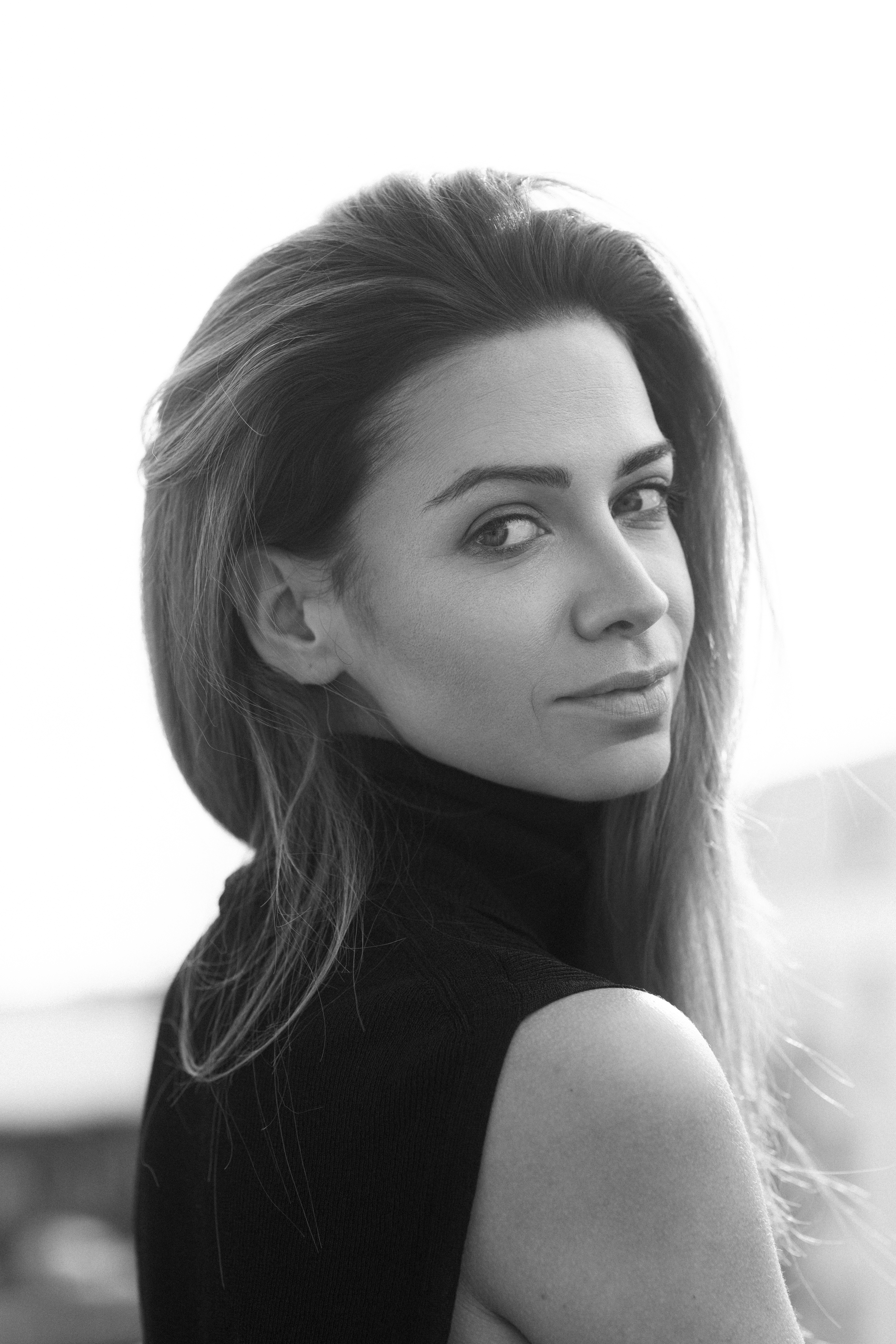 Sandra Staniszewska